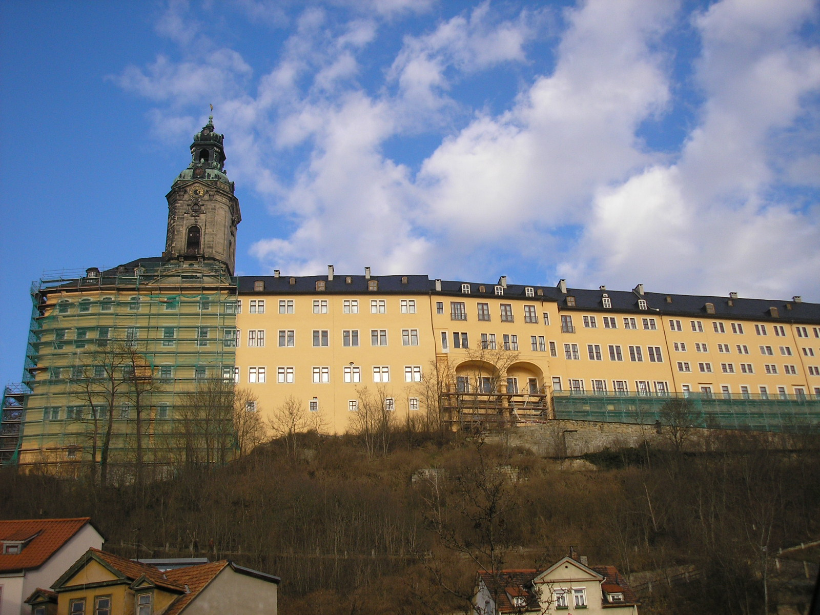 Die Heidecksburg über Rudolstadt (Thüringen).